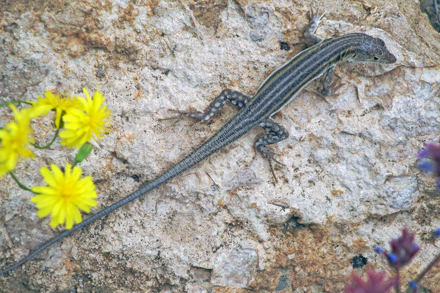 Eremias pleskei